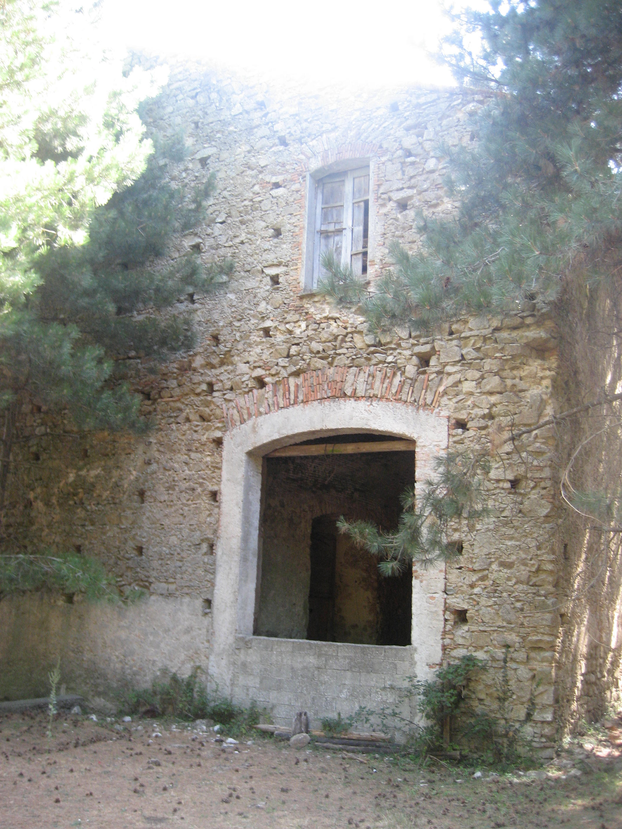 Ferriera_ferdinandea